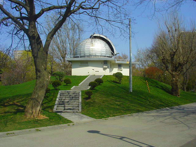 Sapporo Astronomical Observatory, Sapporo, Japan